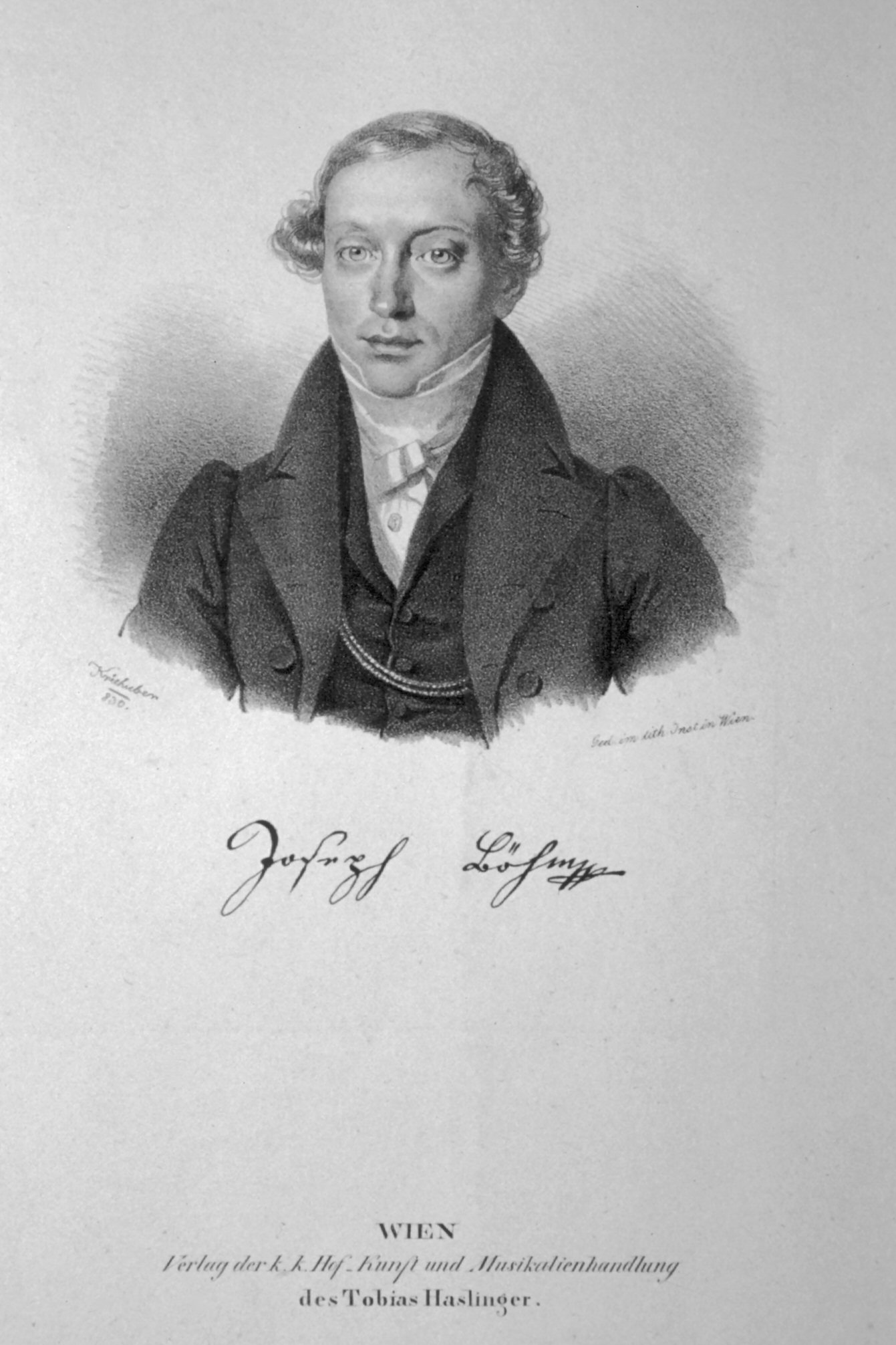 Josef Böhm (1795-1876), österreichischer Geiger und Geigenlehrer